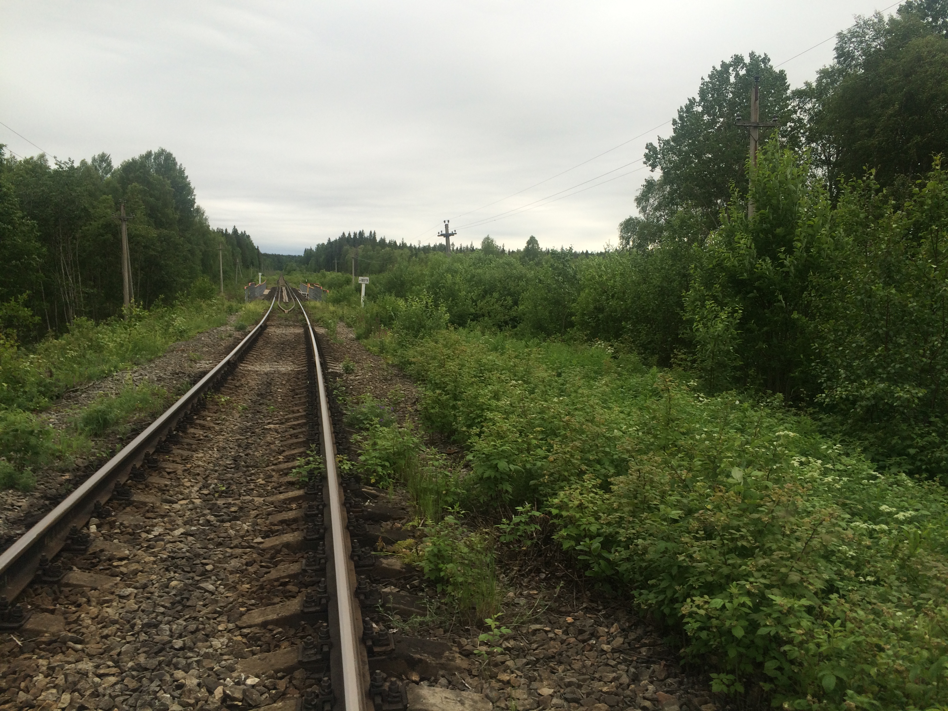 Пусойсваара